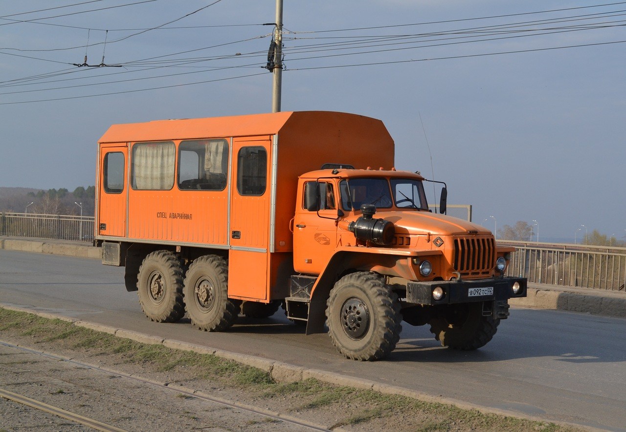 Урал-32551-0010